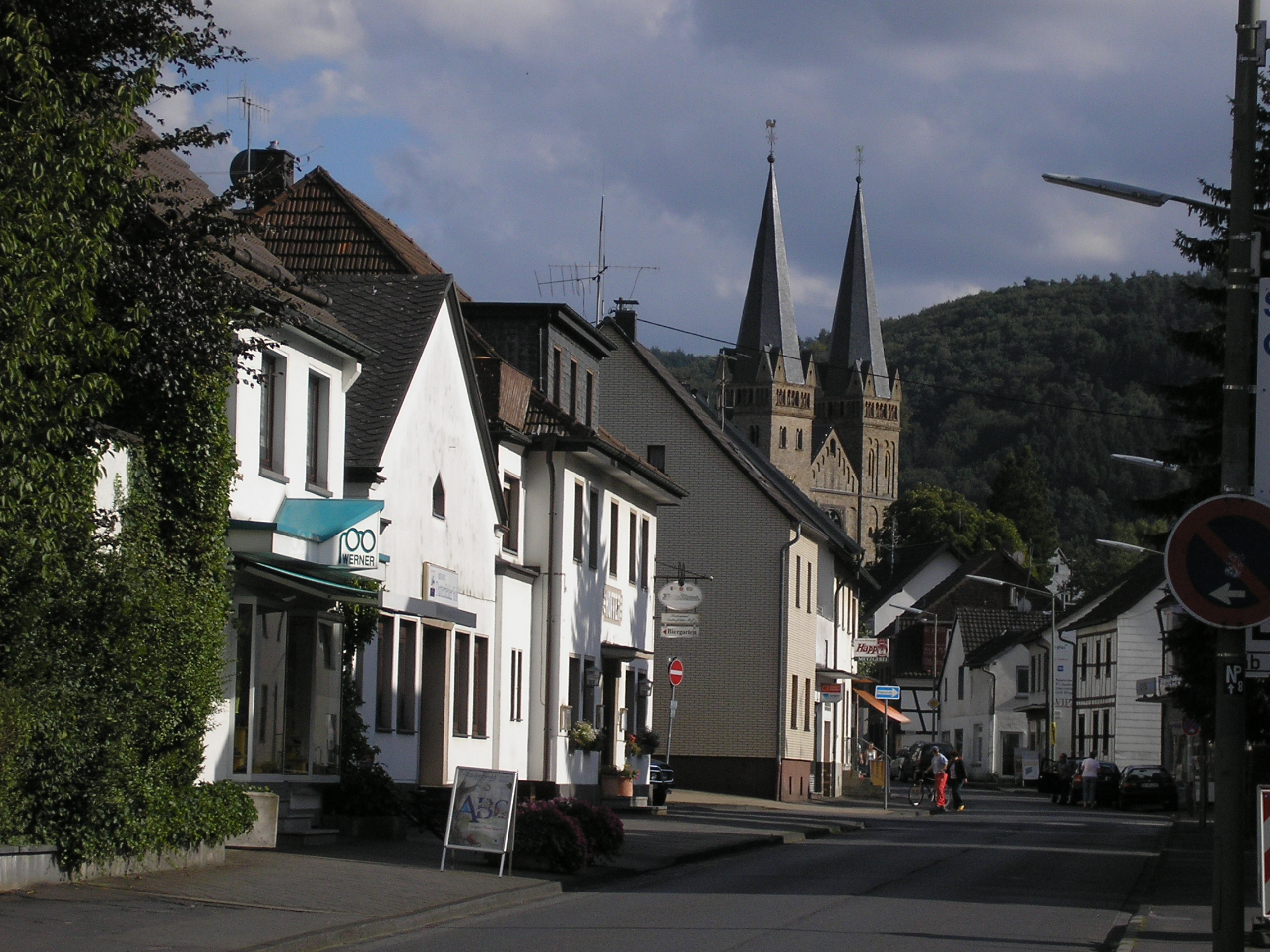 Windeck-Dattenfeld, Hauptstrasse mit Siegtaldom.